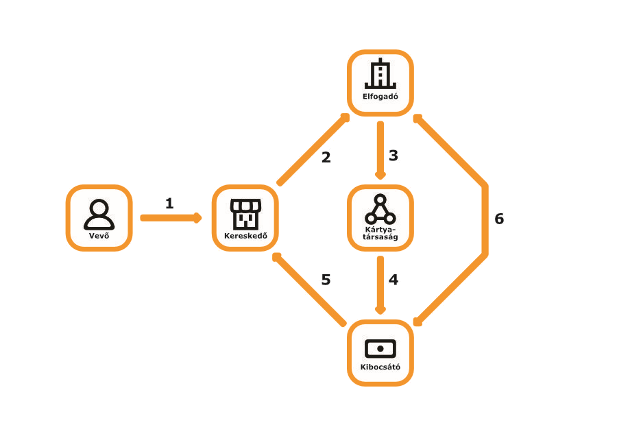 Bankkártya-elfogadás folyamata